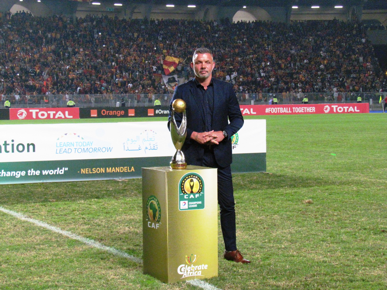 Mark Fish avec le trophée de la Ligue des Champions de la CAF avant le début de la finale retour entre l'Espérance Sportive de Tunis et Al Ahly SC le 9 novembre 2018 au stade olympique de Radès